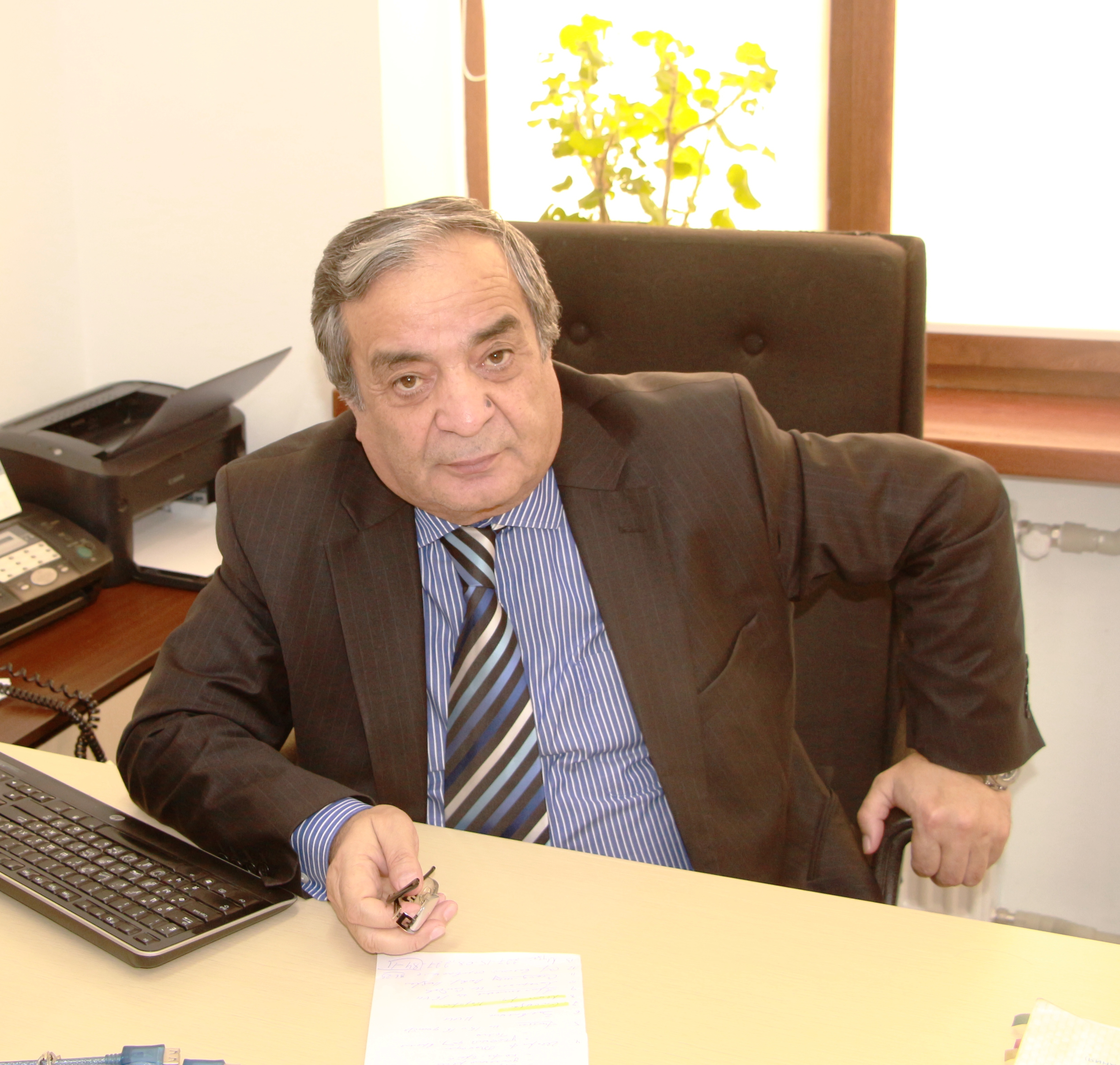 Рахмон Улмасов, экономист, докт. экон. наук, РТСУ, Таджикистан